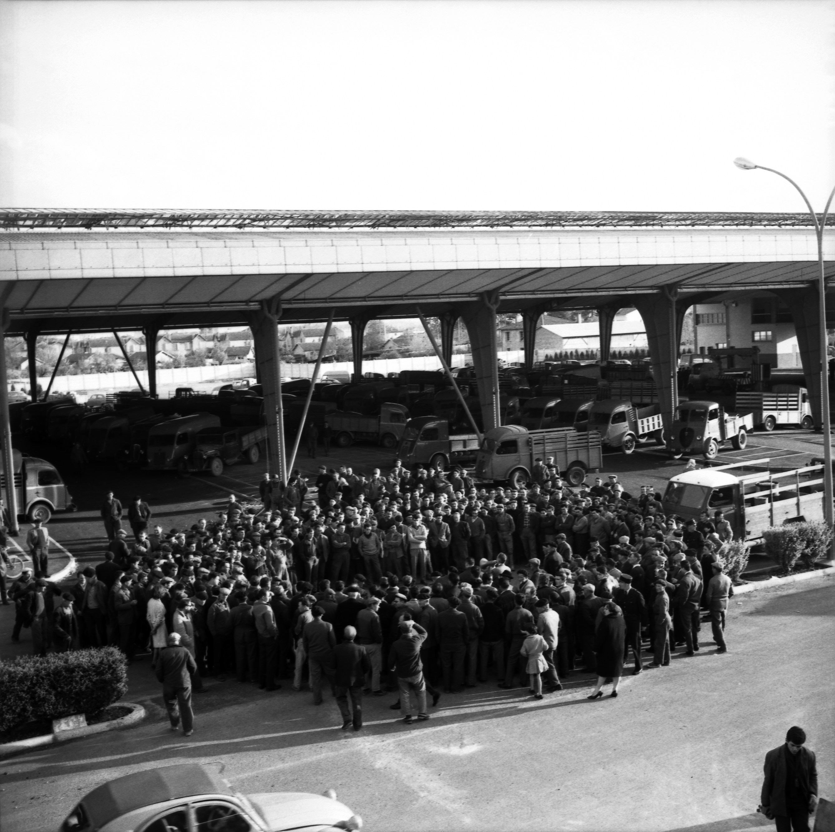 Marché-Gare de Lalande. Le 21 Avril 1964. Vue d'un rassemblement sous la halle du Marché-Gare de Lalande.